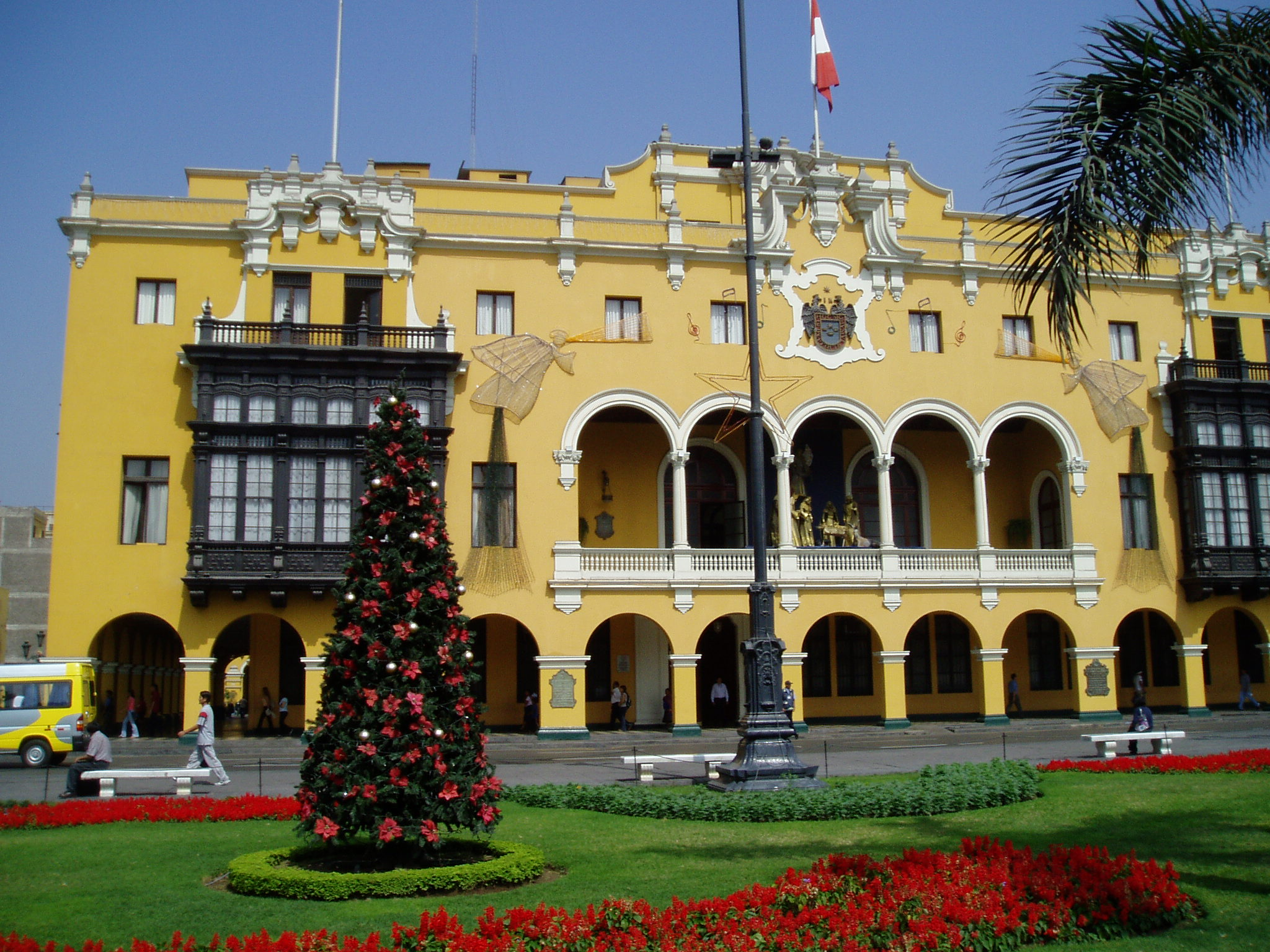 Lima Municipal CouncilPC270019